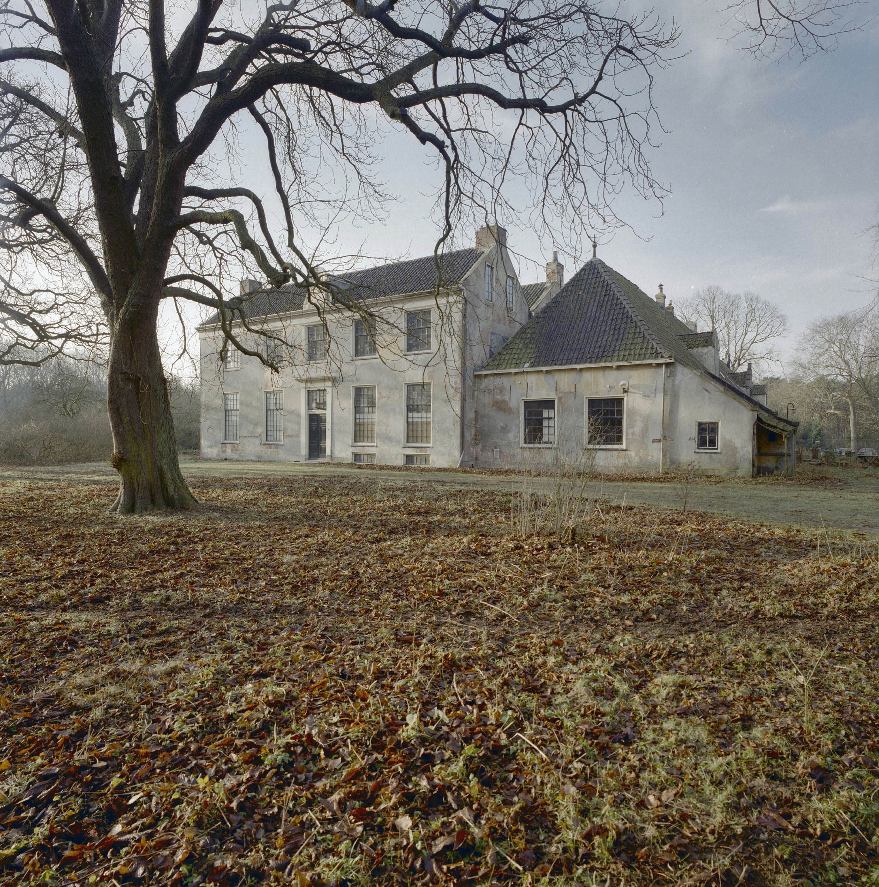 Groot Bentveld: Exterieur overzicht